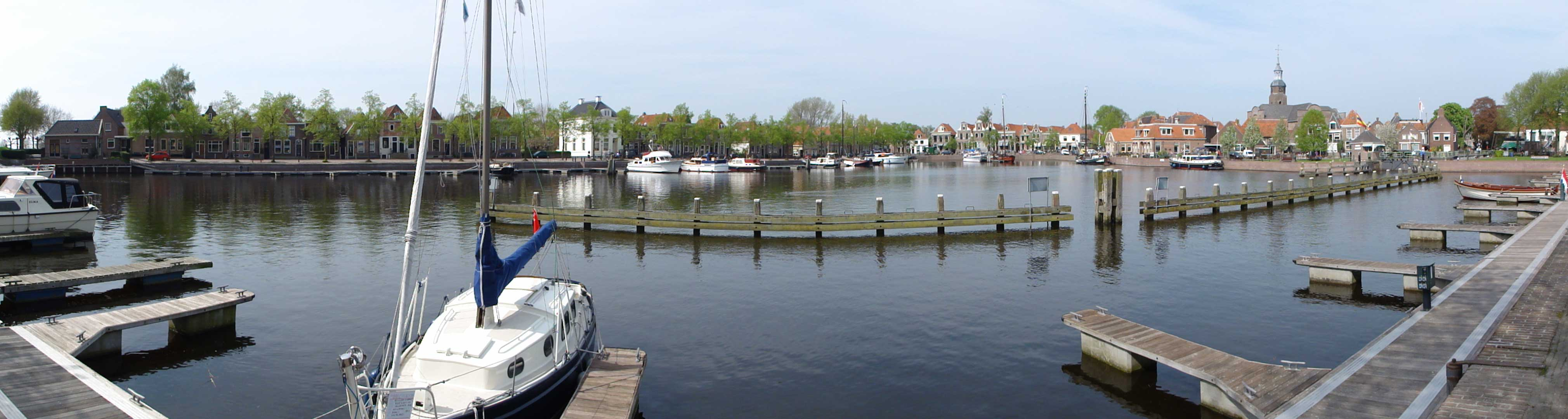 Noorderkade Bierkade Zuiderkade Blokzijl (rijksmonument)